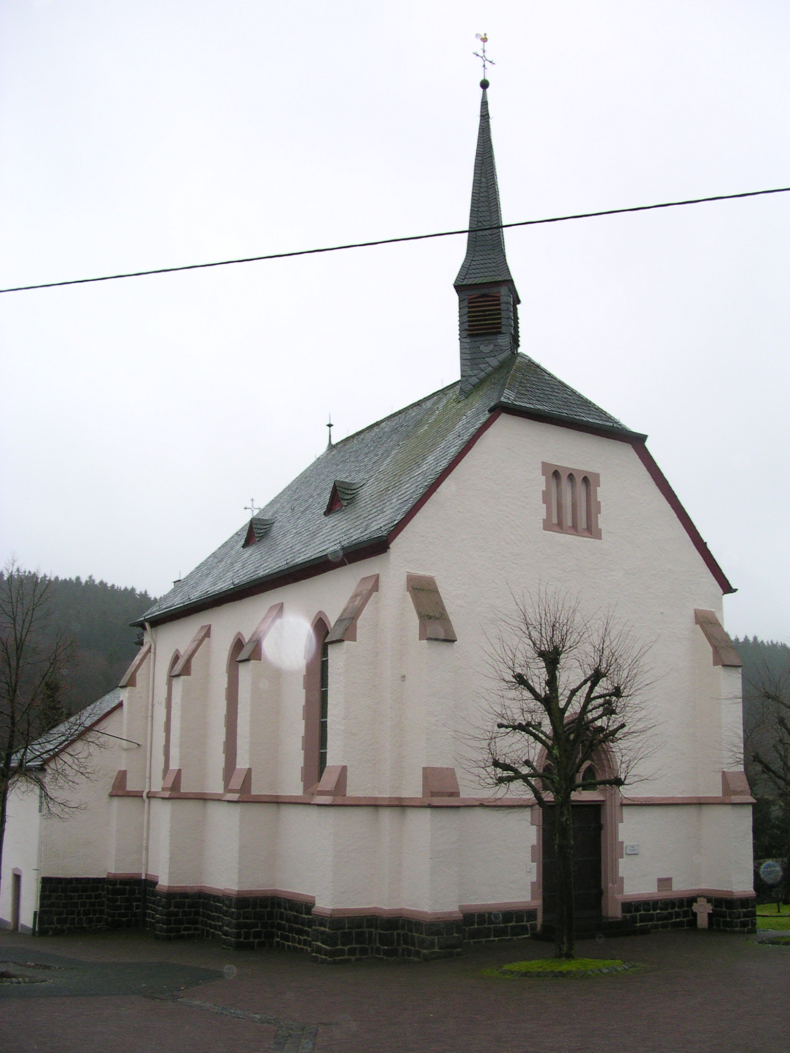 Daun-Rengen, rk. Filialkirche “St. Kunibert” - ehemalige Wallfahrtskapelle mit Holzfiguren der 14 Nothelfer und Holzaltar von Anfang des 18. Jahrhunderts